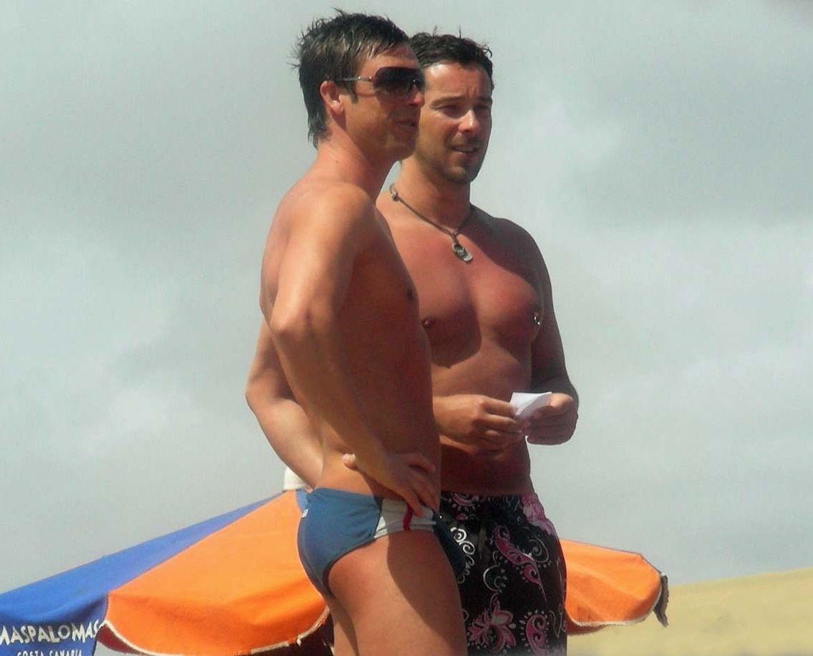 Gran Canaria 2009